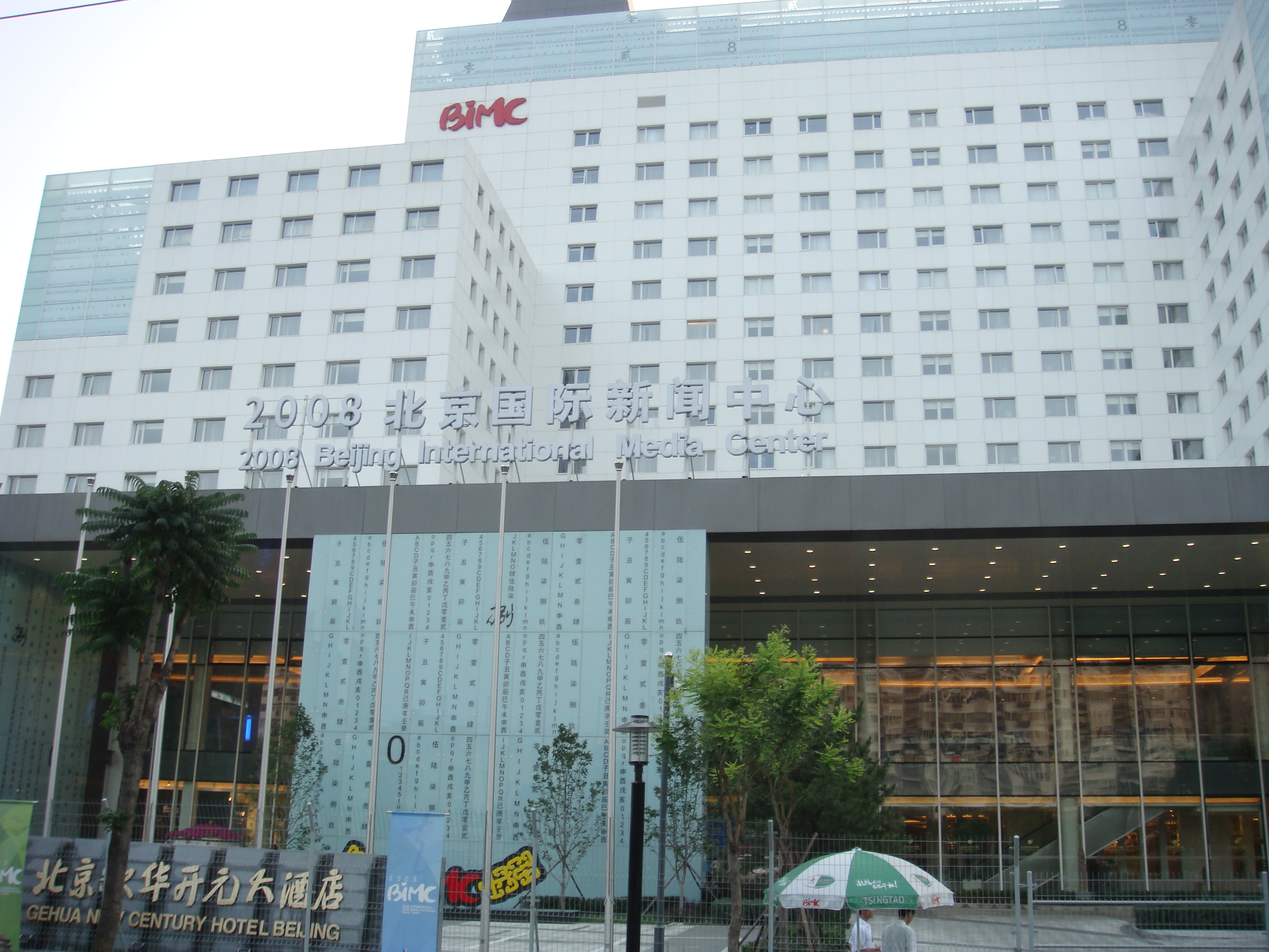 BIMC A座